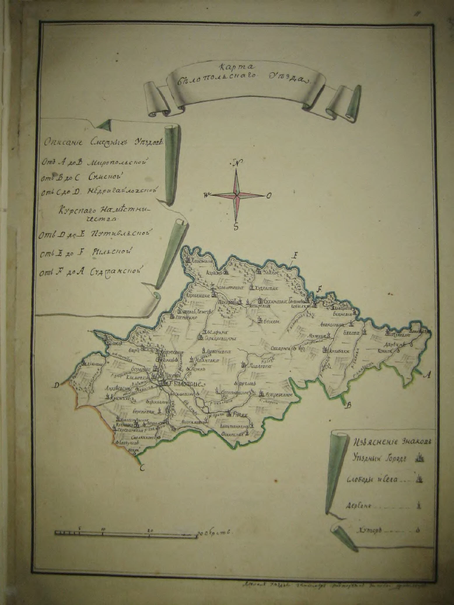 Харківське намісництво. Мапа Білопільського повіту з альбому мап намісництва. 1787 рік.